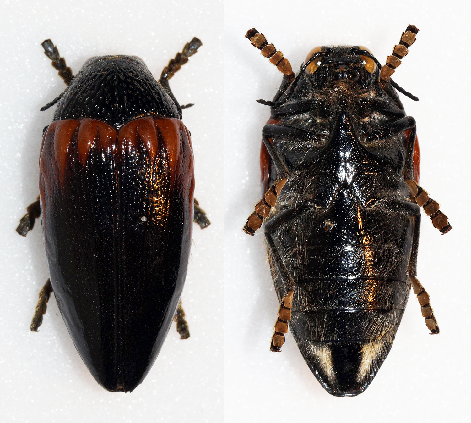 Kerrmans,1886 Sex: Female Data: 21-03-12 - Ruparama - Tosamaganga - Tanzania Size: 35.2mm